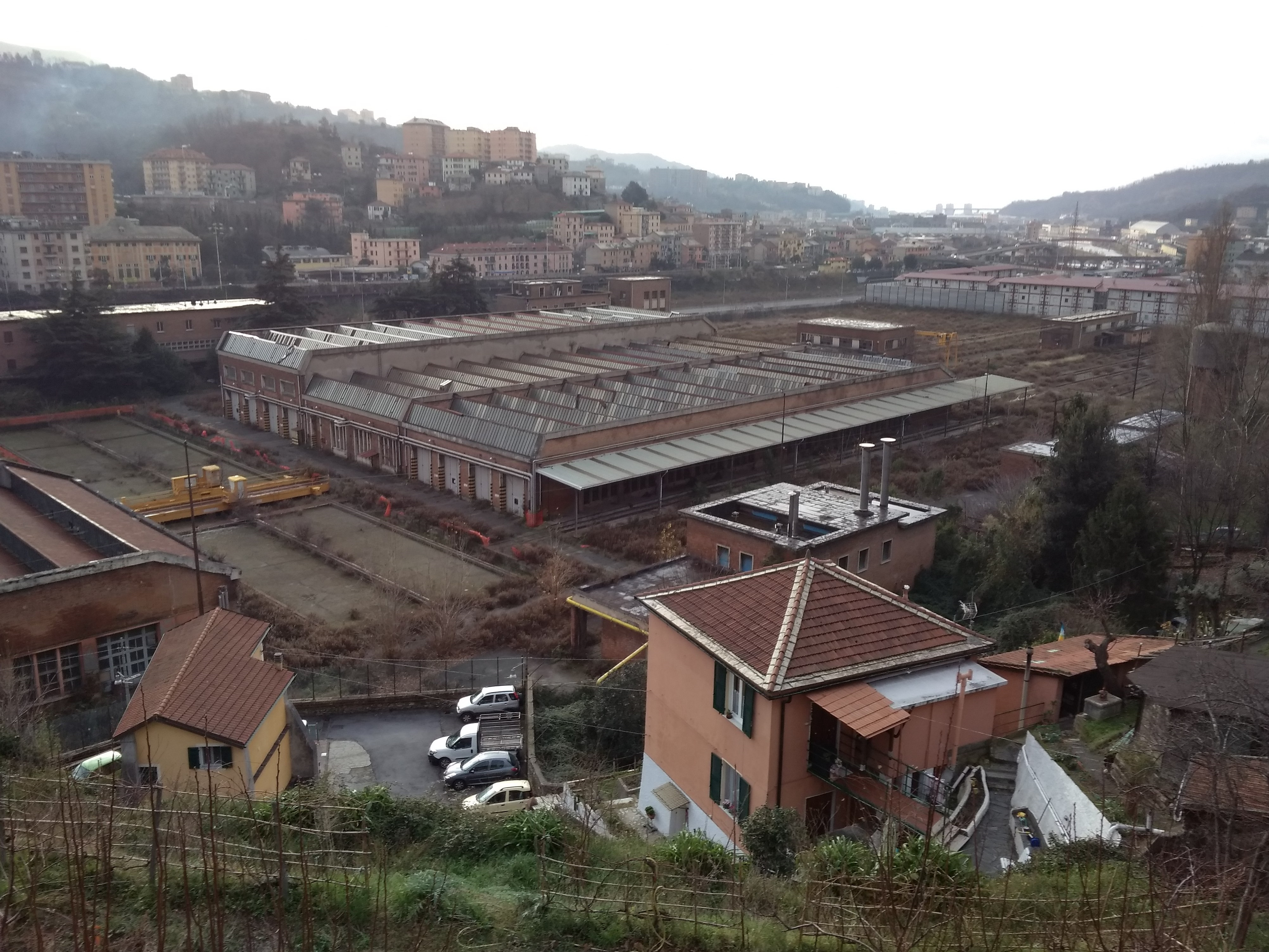 Genova, quartiere di Bolzaneto, i capannoni dismessi della ex "squadra rialzo" di Trasta delle ferrovie dello Stato